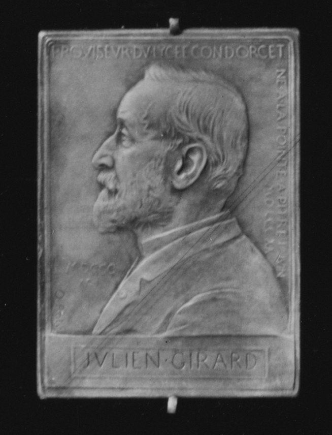 French; Plaquette; Medals and Plaquettes